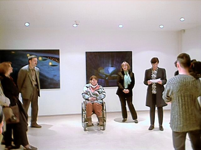 Ilyés Márta Műcsarnoki megnyitó